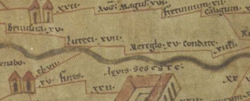 Crosne sur la table de Prutinger